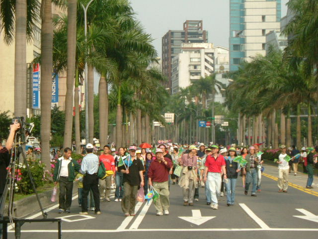 2005年三二六護台大遊行，行經仁愛路的隊伍。